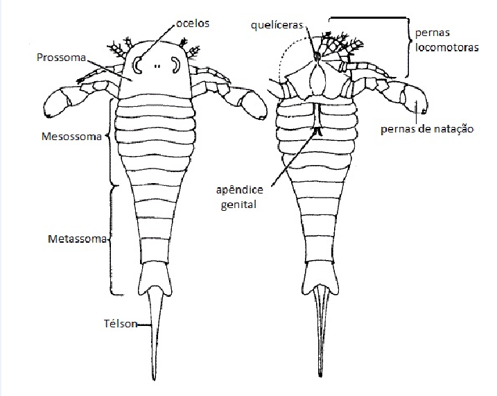 Divisão do corpo, apêndices corporais e ocelos